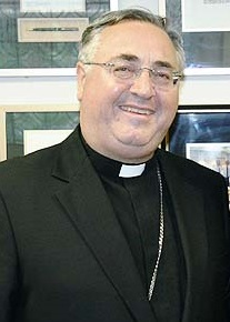 Archbishop Salvatore Pennacchio - Apostolic Nuncio to India